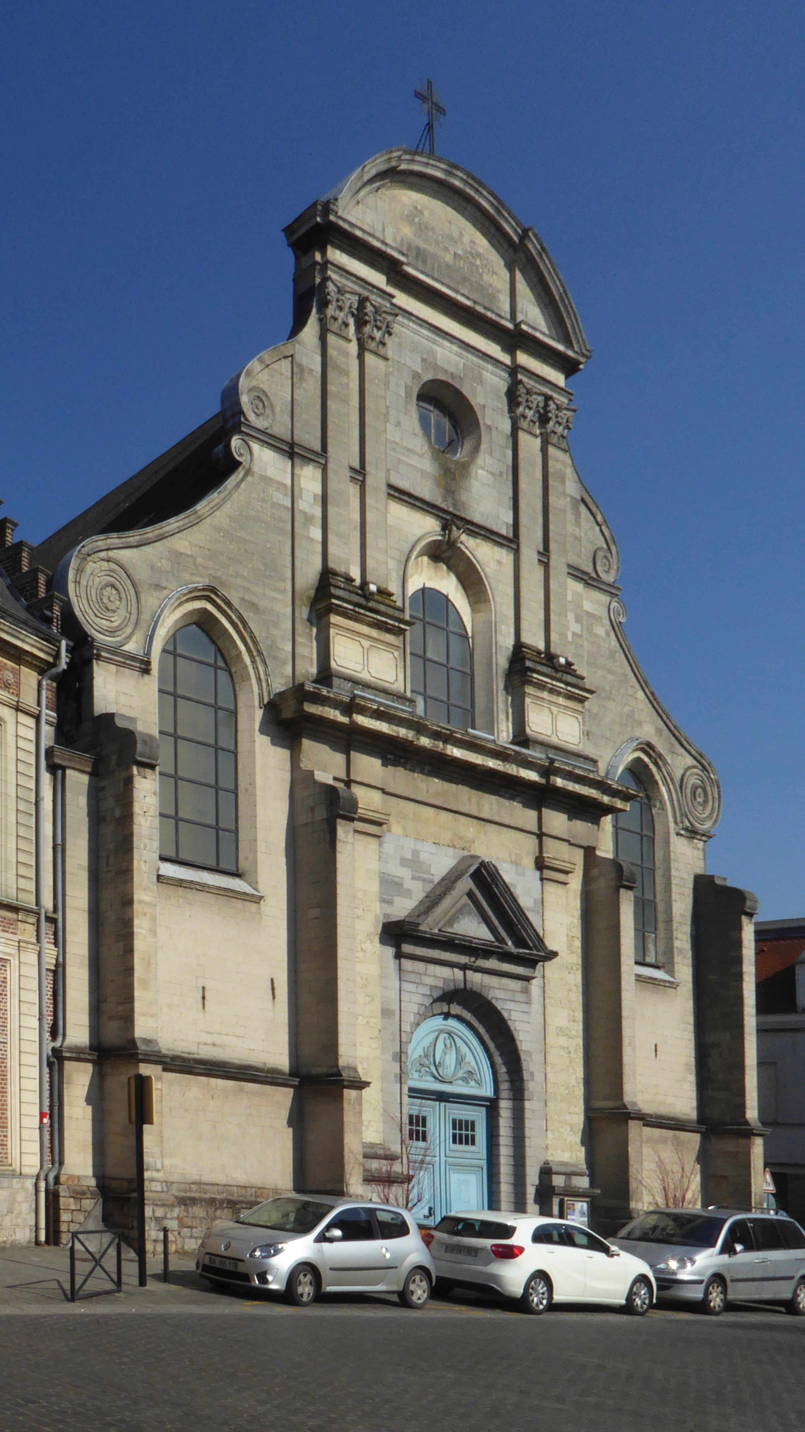 Valenciennes la Bibliothèque municipale Nord (département français). This building is en partie classé, en partie inscrit au titre des Monuments Historiques. .